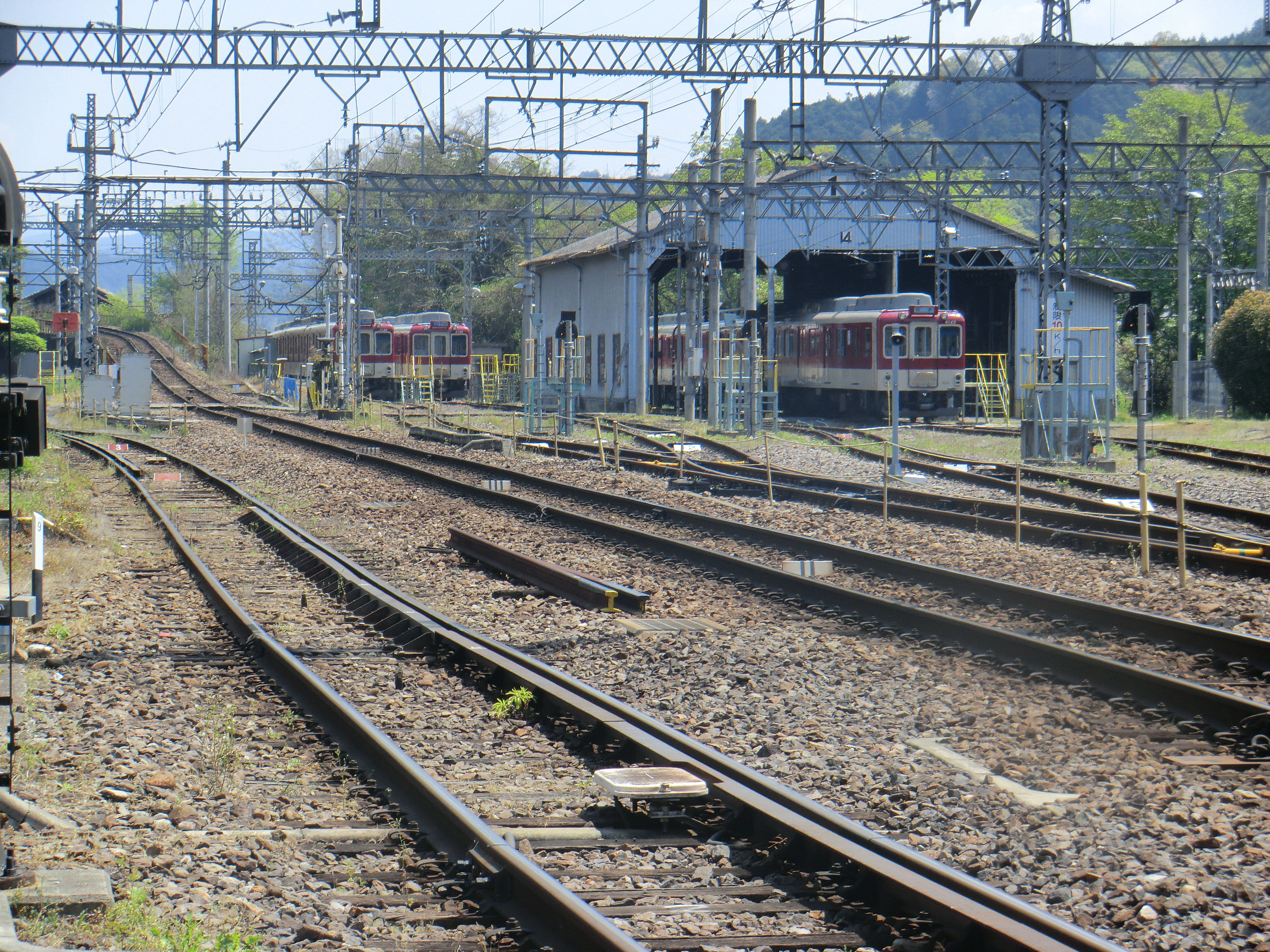 近鉄吉野線六田駅の車庫